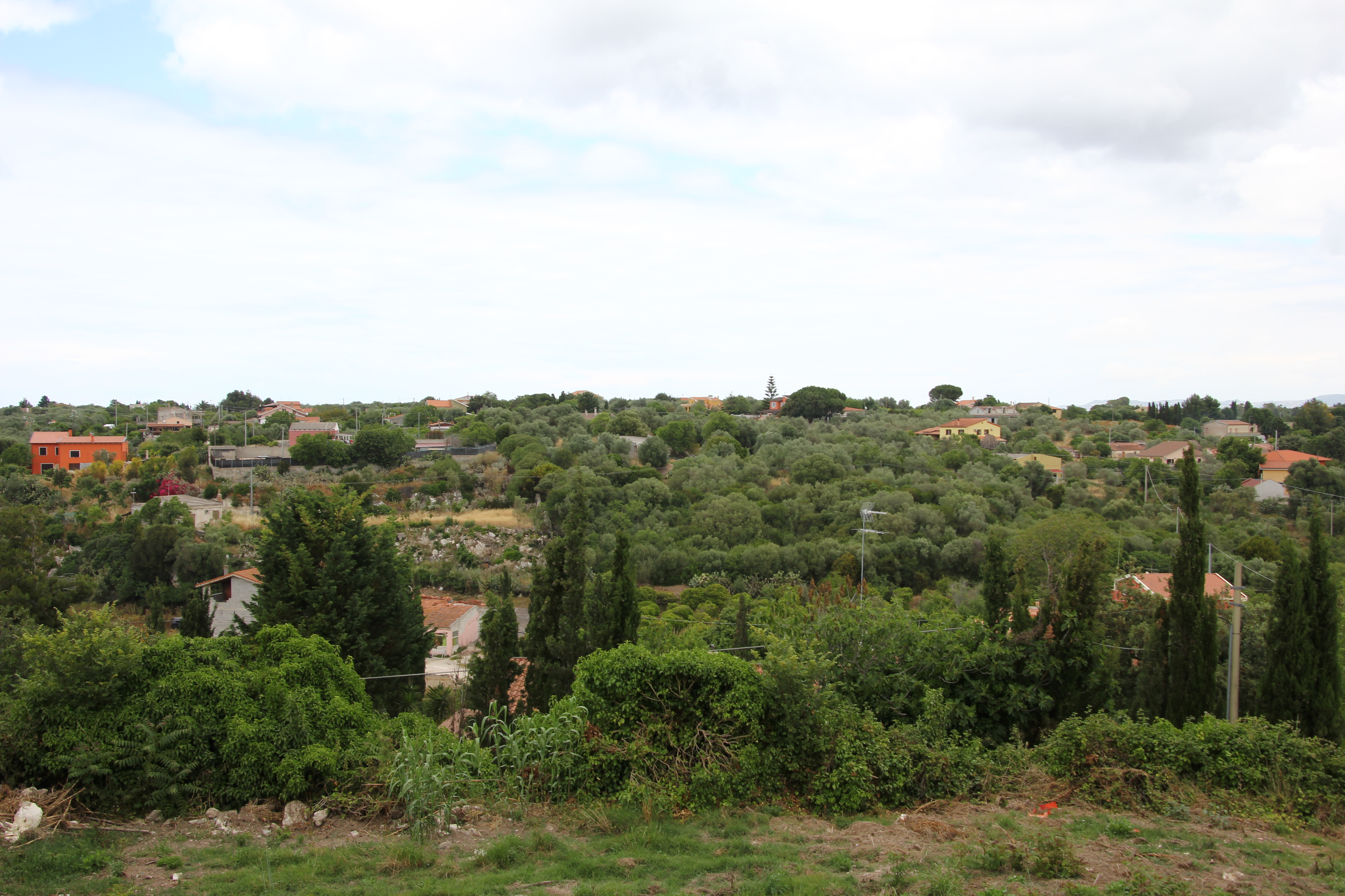 Sassari, frazione San Quirico